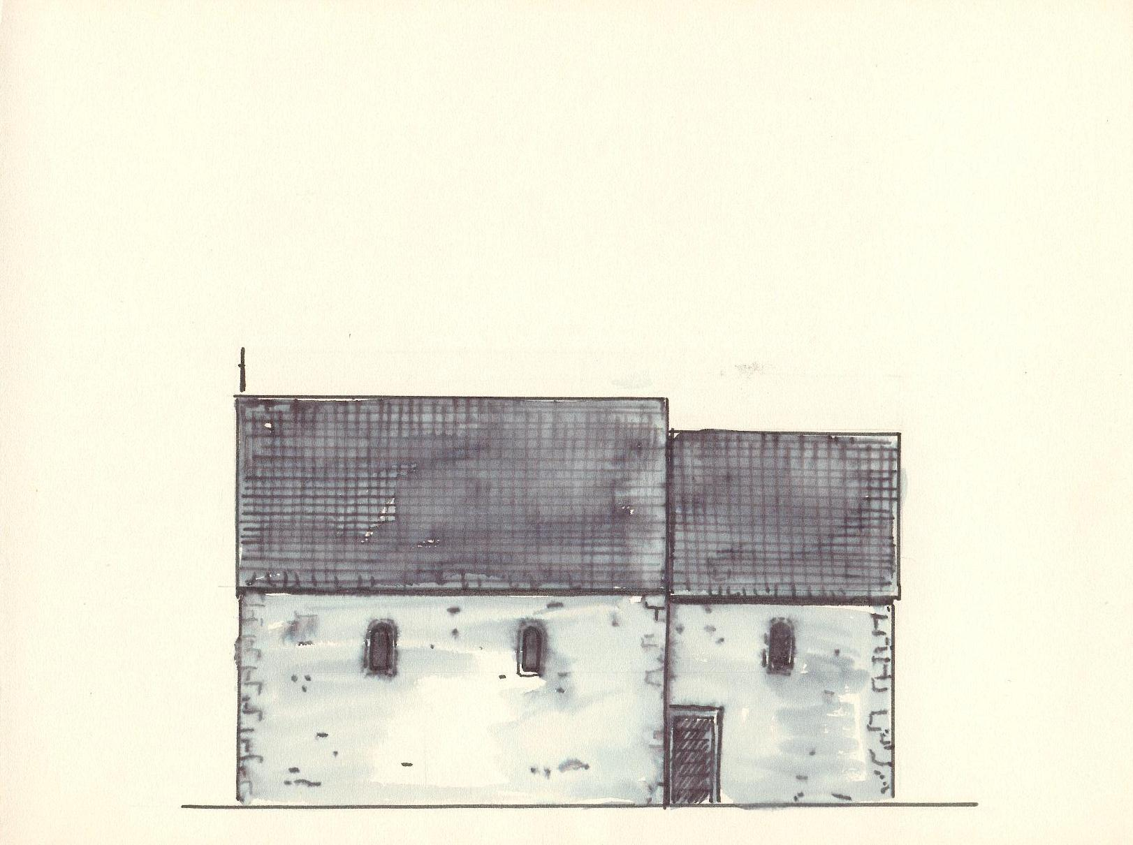 Rekonstruktion der Wittelbacher Kirche von 1132